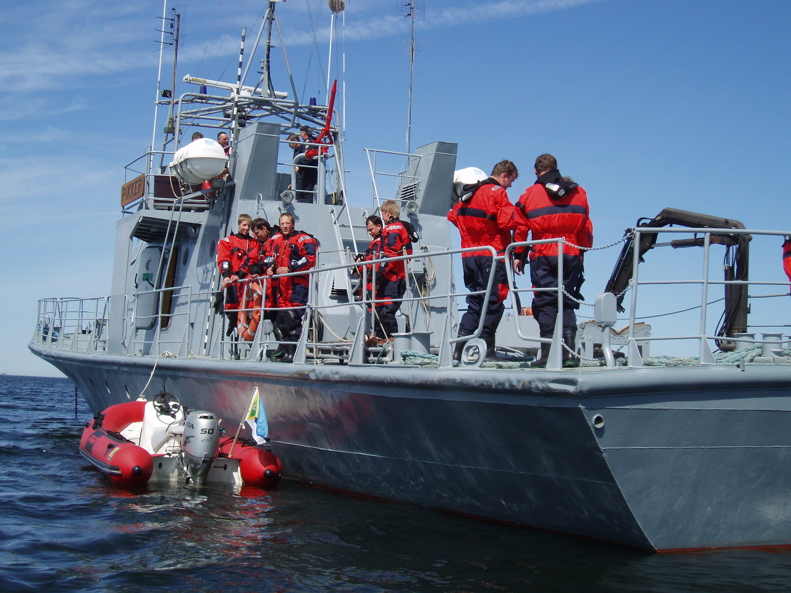 Merepäästeõppus koostöös vabatahtlike merepäästjatega.